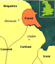 Mapa del territorio de los Parisii